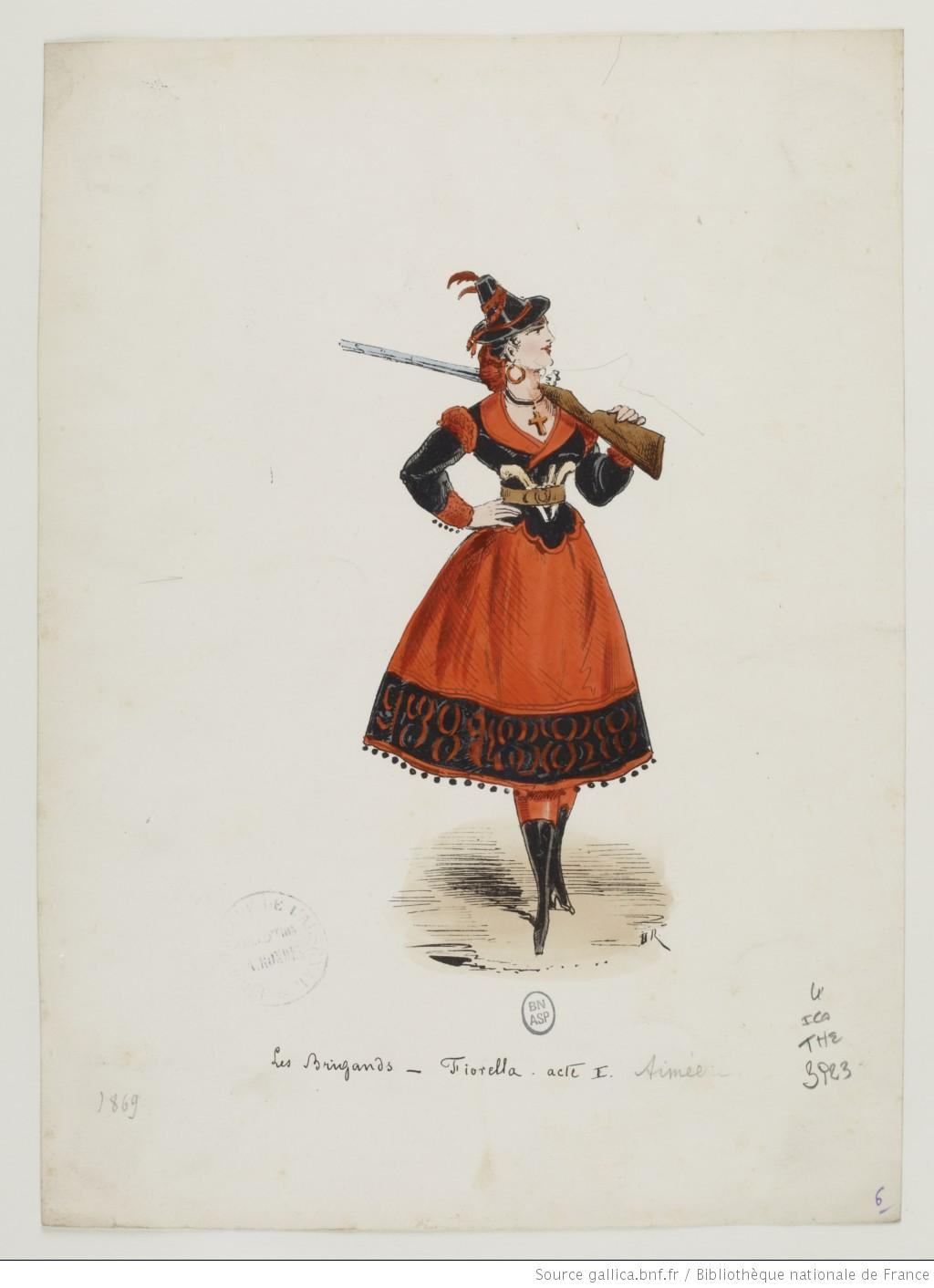 Les Brigands, costume de Fiorella à l'acte I